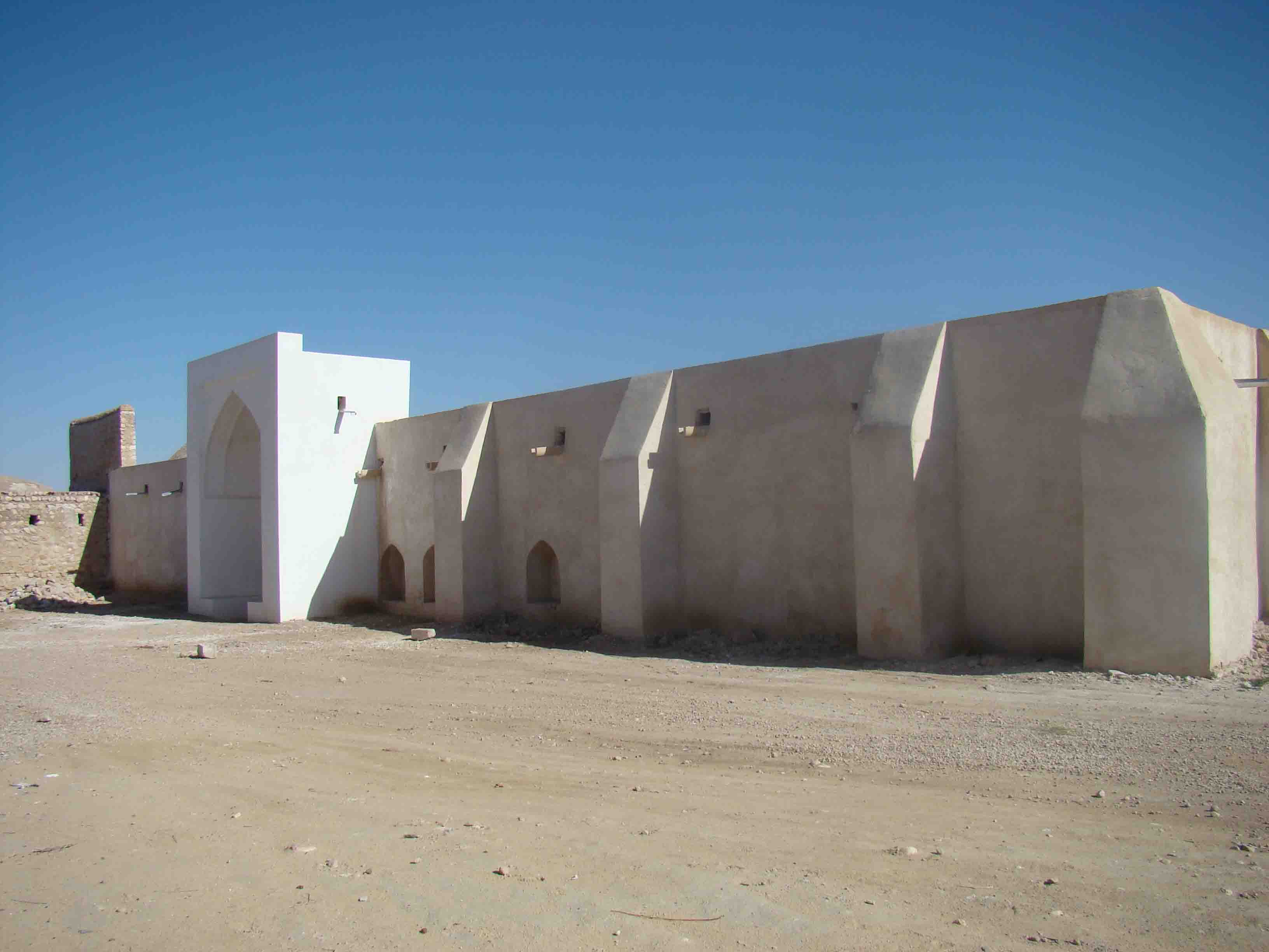 کاروانسرای خواجه ابوالحسن نمای بیرونی